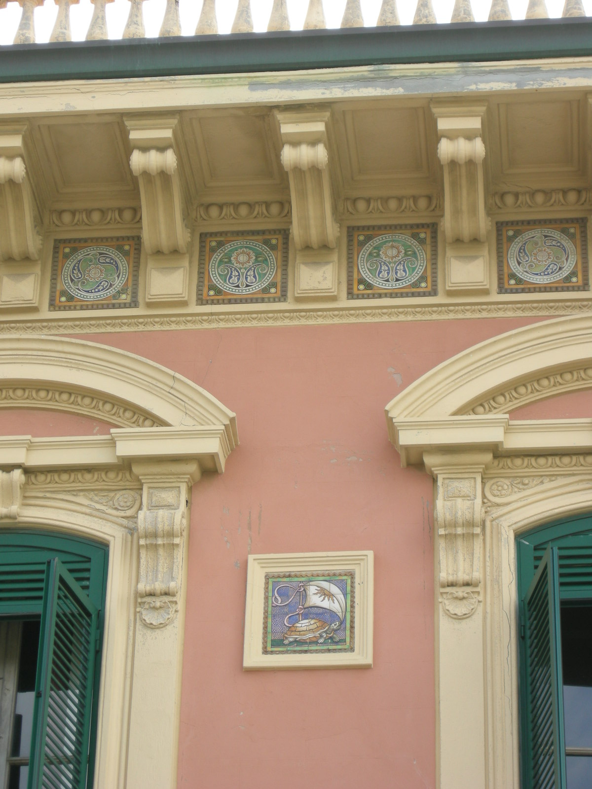 Villino Brunetti, dettaglio 2